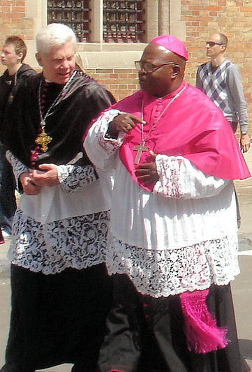 SANGUIS Brvgensis, Zacchaeus Okoth (rechts) 2009